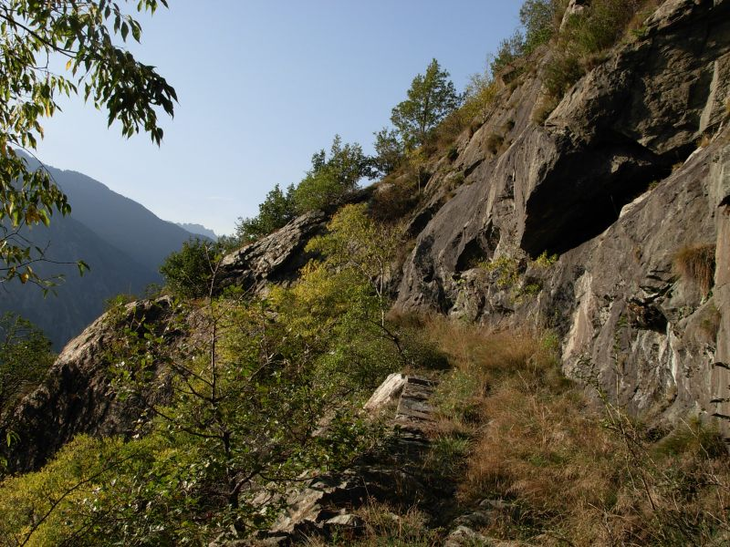 Strada militare scavata nella roccia verso Forte di Machaby, Arnad, Valle d'Aosta, Italia.